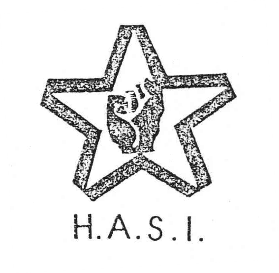 Logo de Herri Alderdi Sozialista Iraultzailea (HASI)